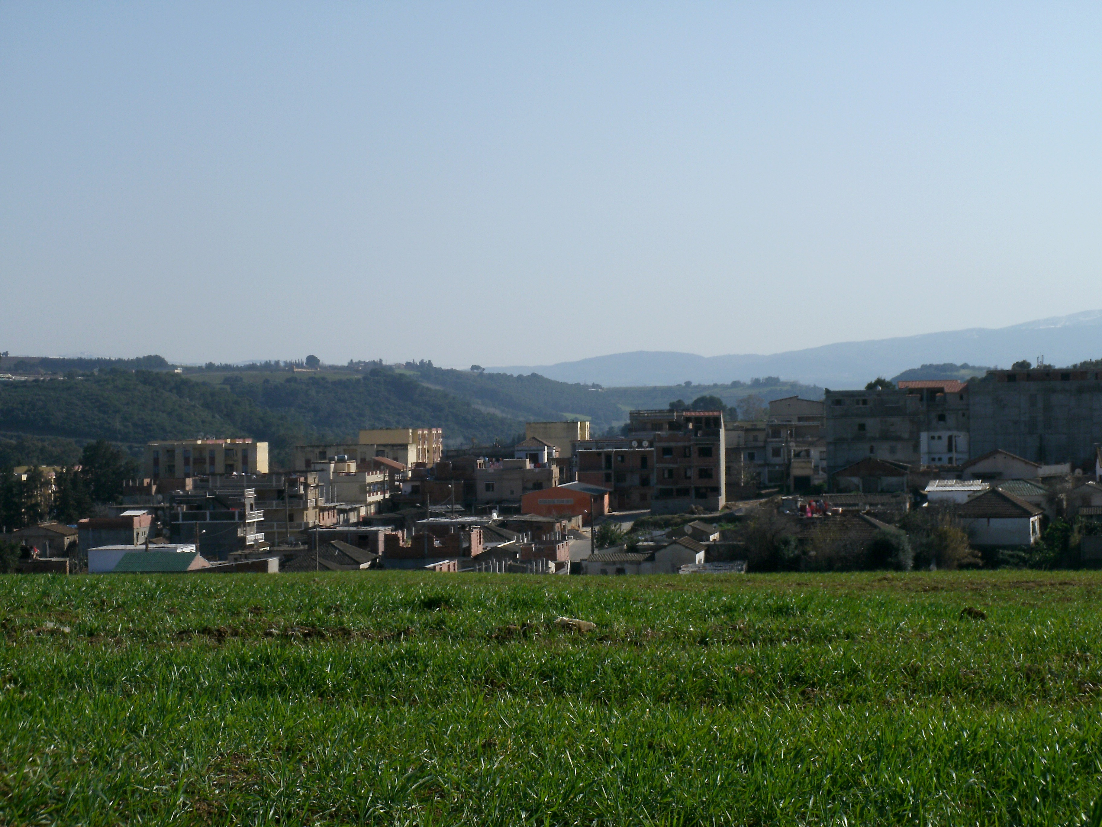 Nador, commune de la wilaya de Tipaza